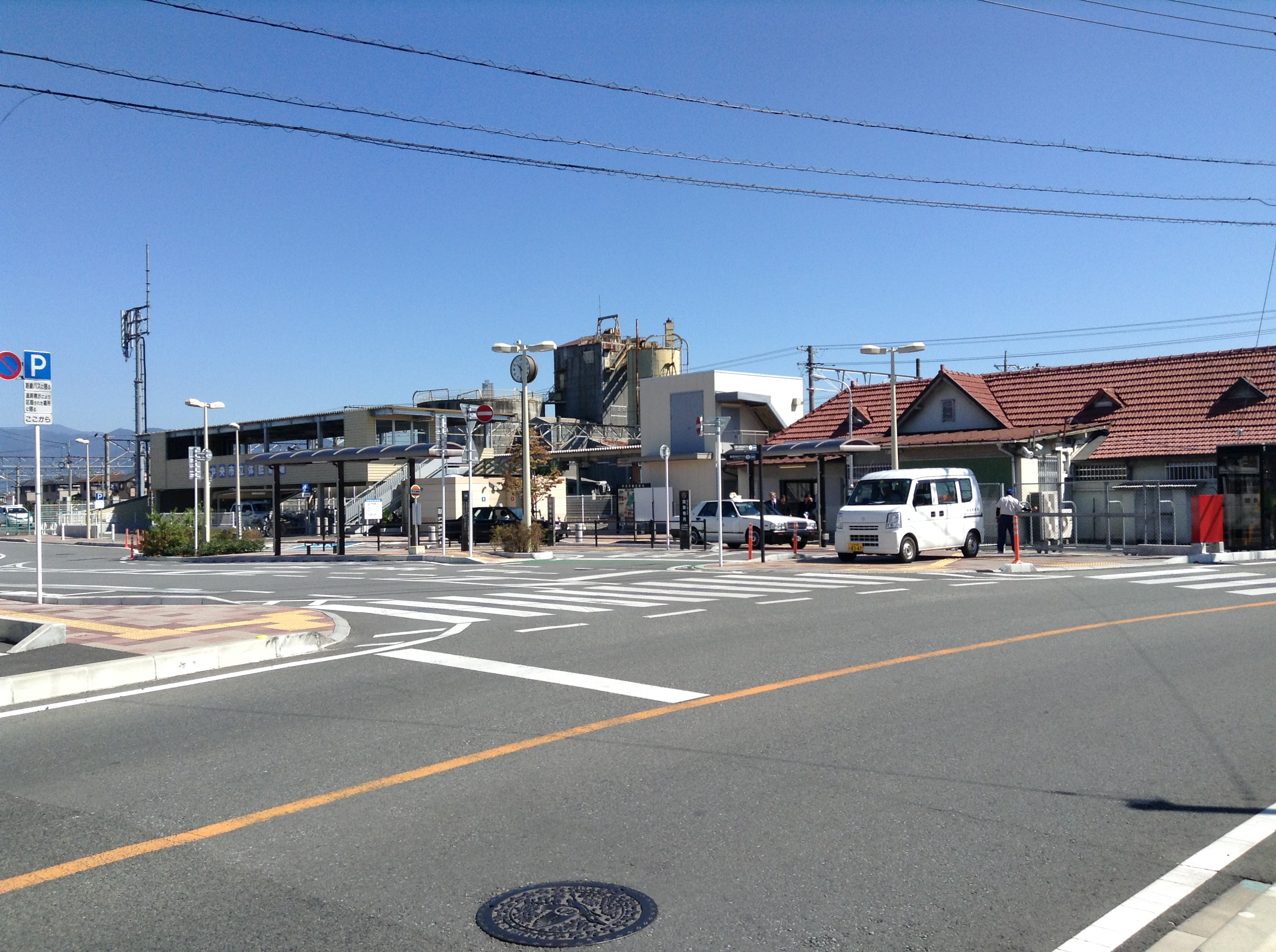 JR東花輪駅 駅舎・駅前ロータリー写真